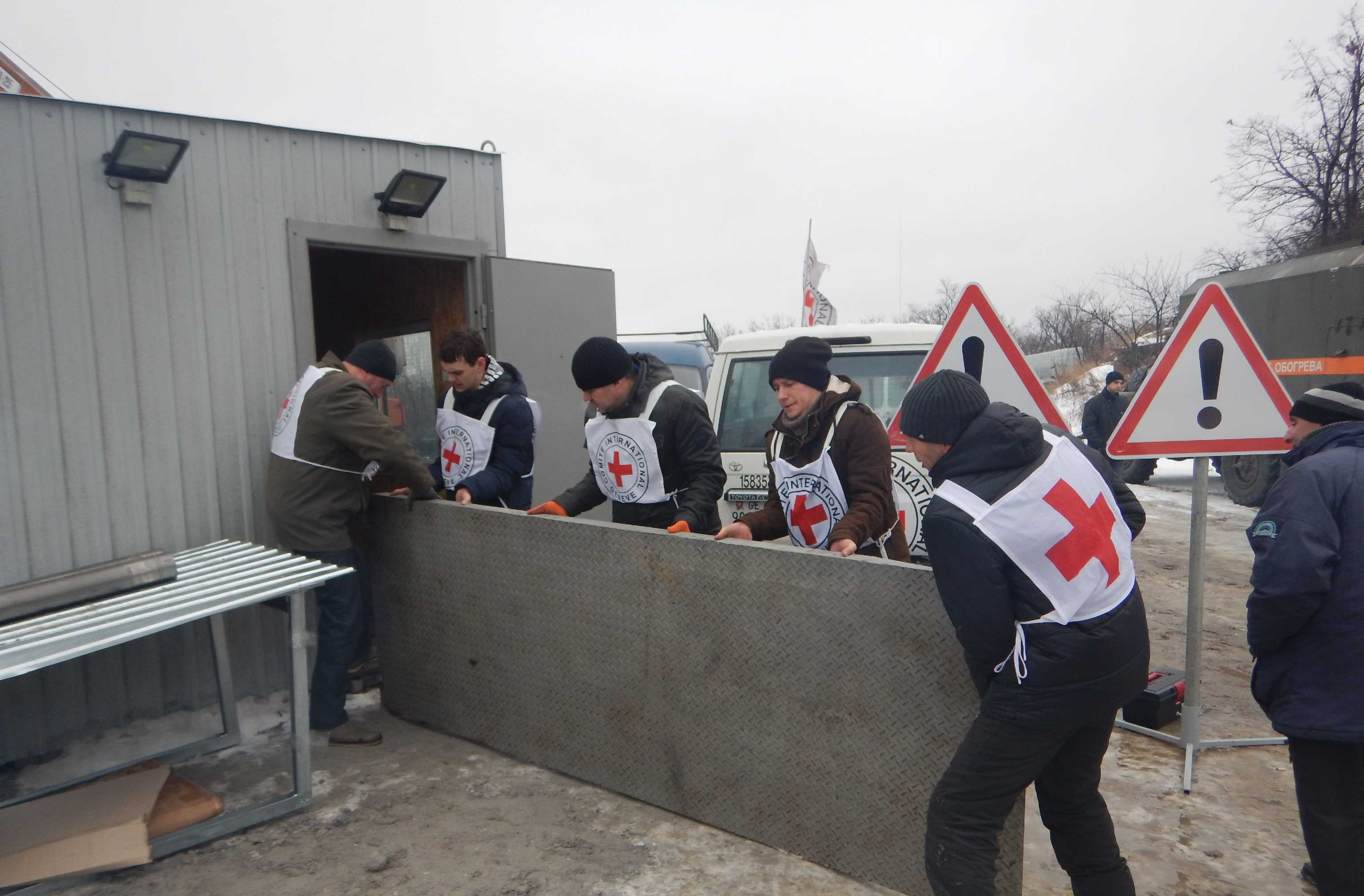 Працівники МКЧХ монтують модуль для відпочинку людей, що перетинають лінію розмежування.